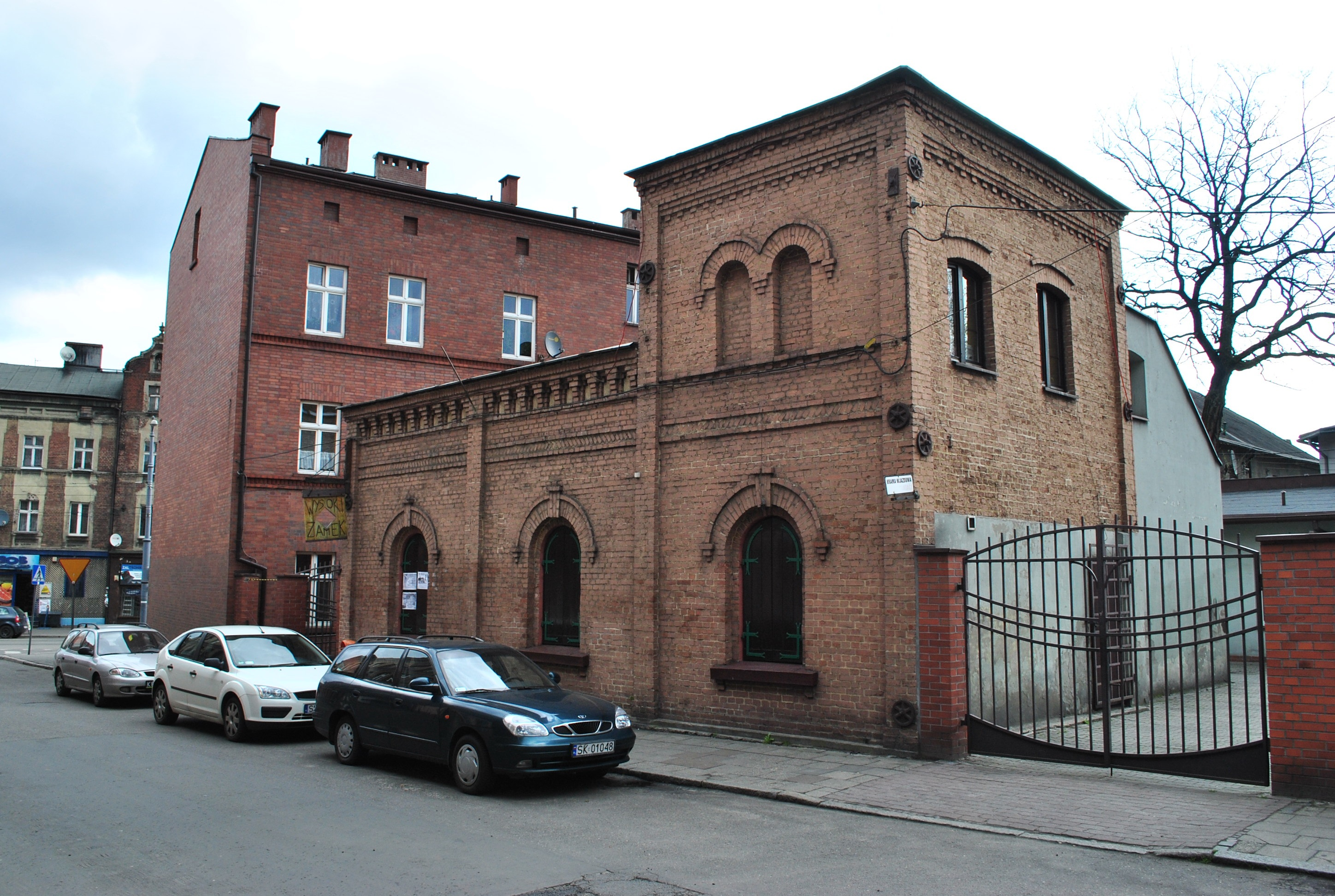 Katowice - Załęże. Klub Wysoki Zamek przy ul. Gliwickiej 96